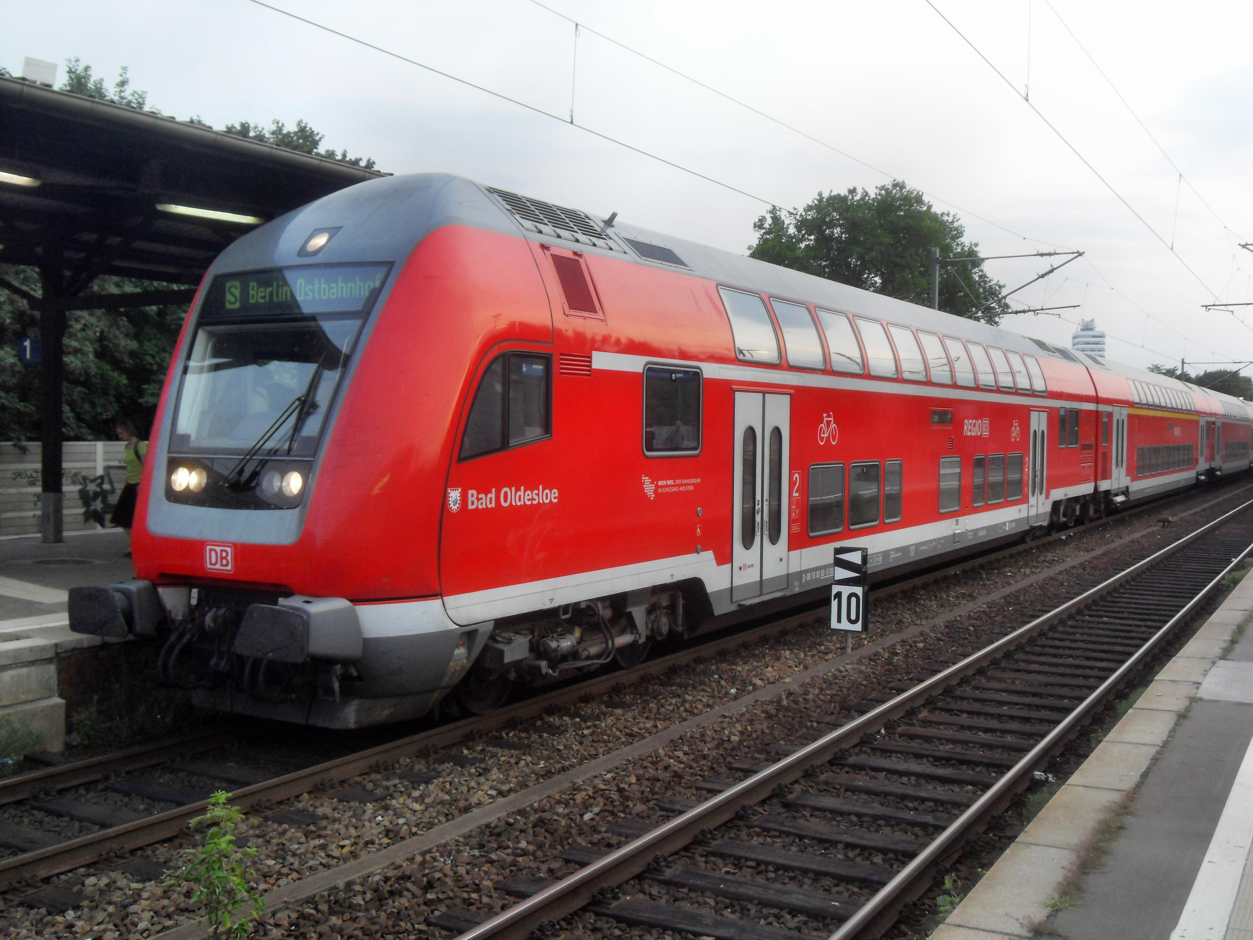 Doppelstockwagen für den Ergänzungsverkehr der S-Bahn Berlin im Bahnhof Berlin-Charlottenburg auf dem Weg nach Berlin Ostbahnhof in Deutschland